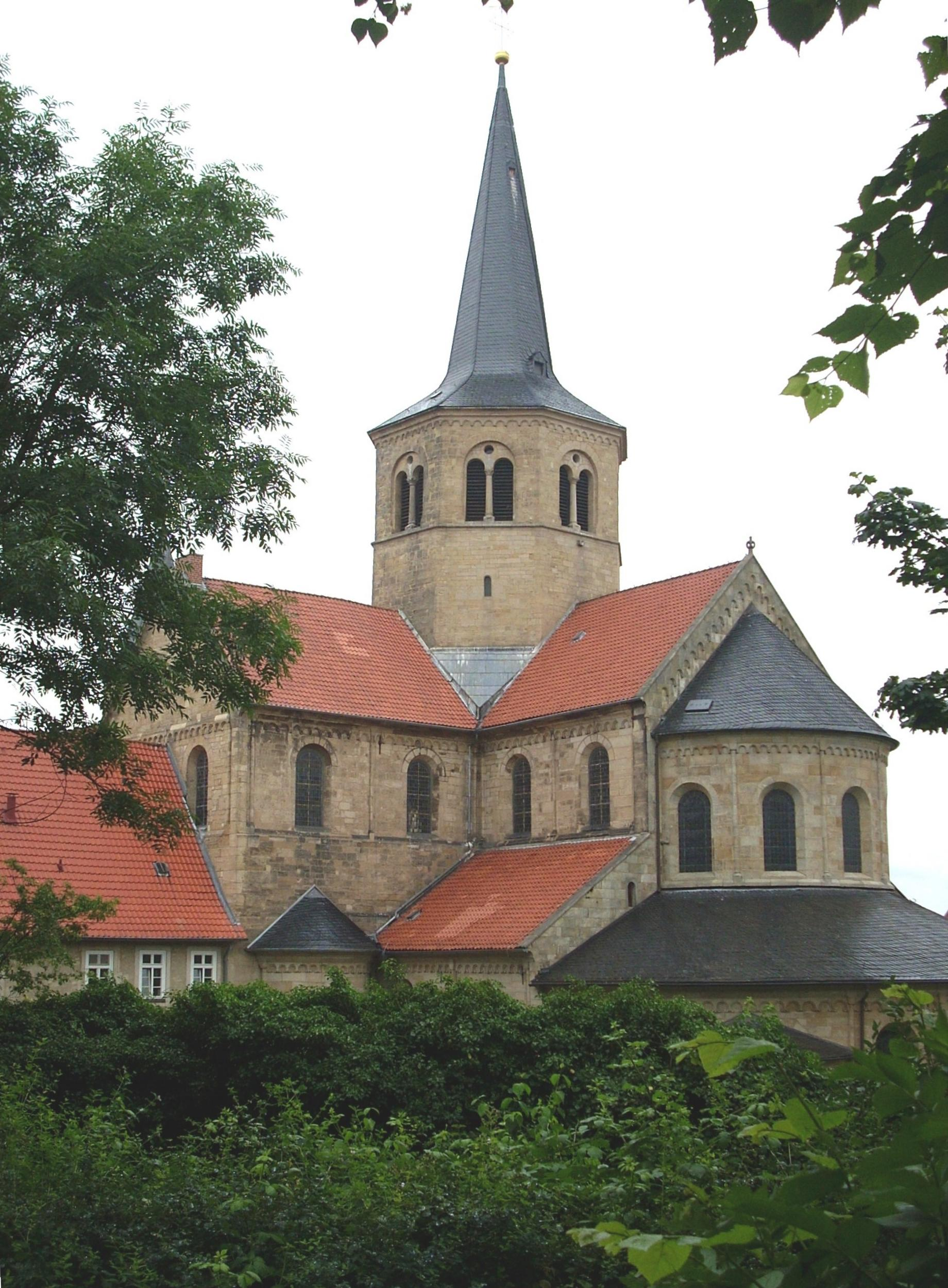 St. Godehard Basilika, Vierung mit Vierungsturm; Hildesheim, Germany